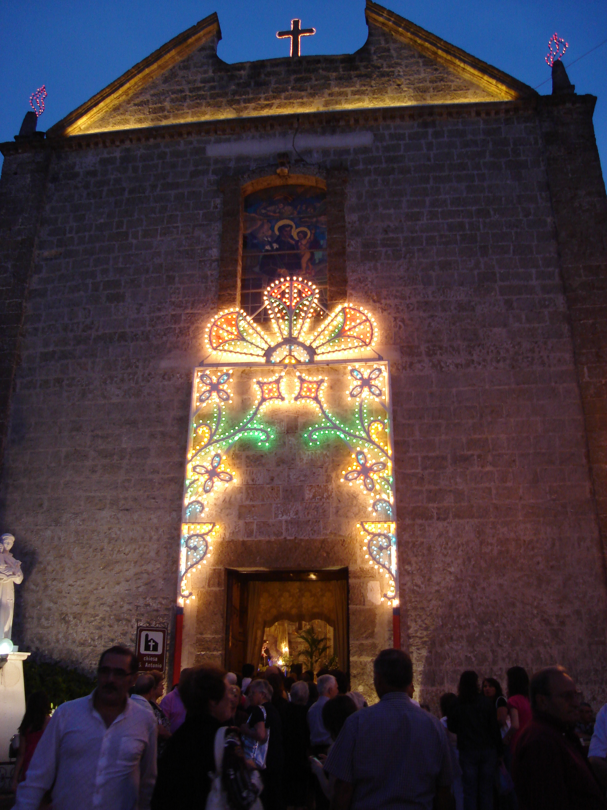 Chiesa di Sant'Antonio di Padova